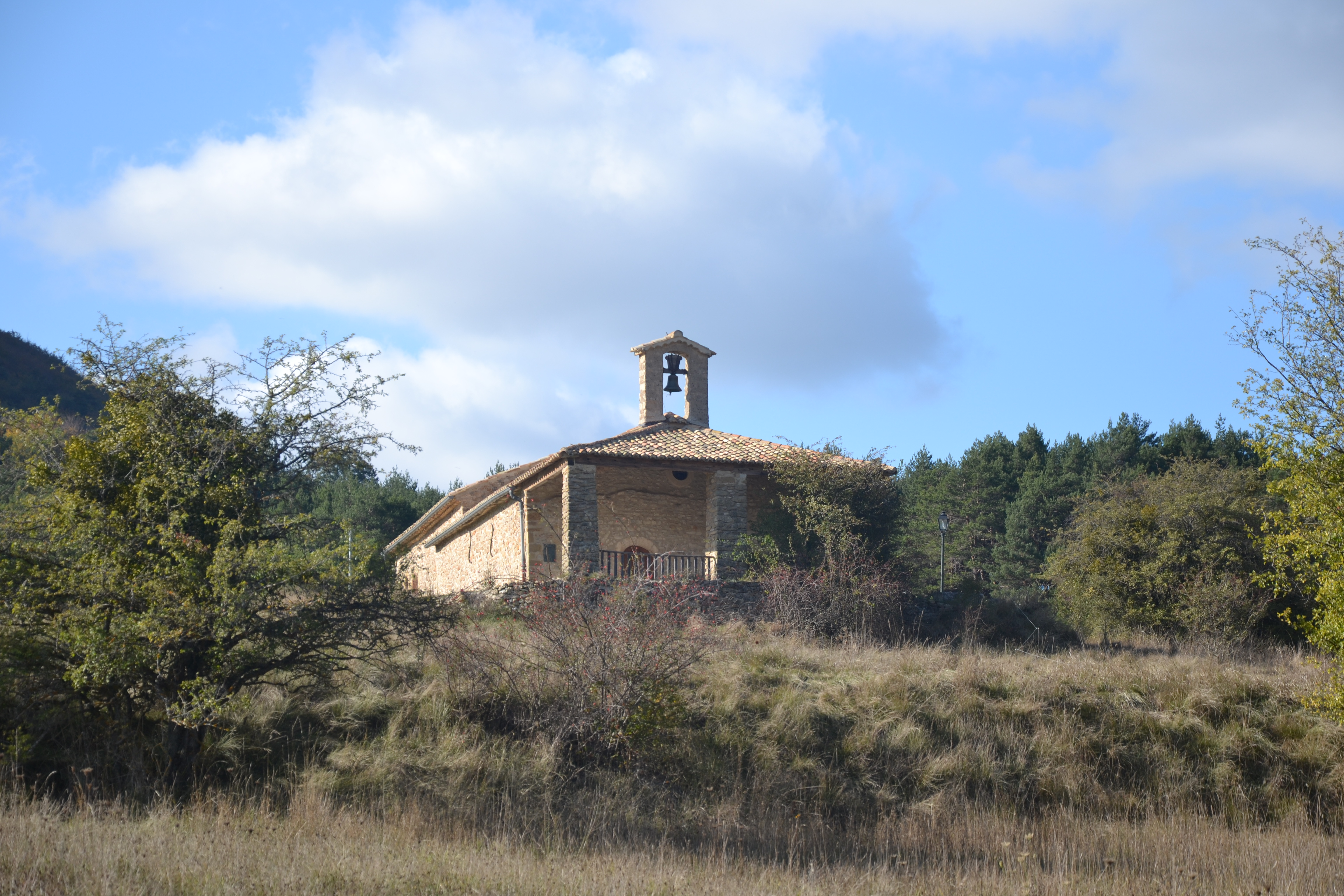 chapelle St Damien & Saint Côme de Vers-sur-Méouges